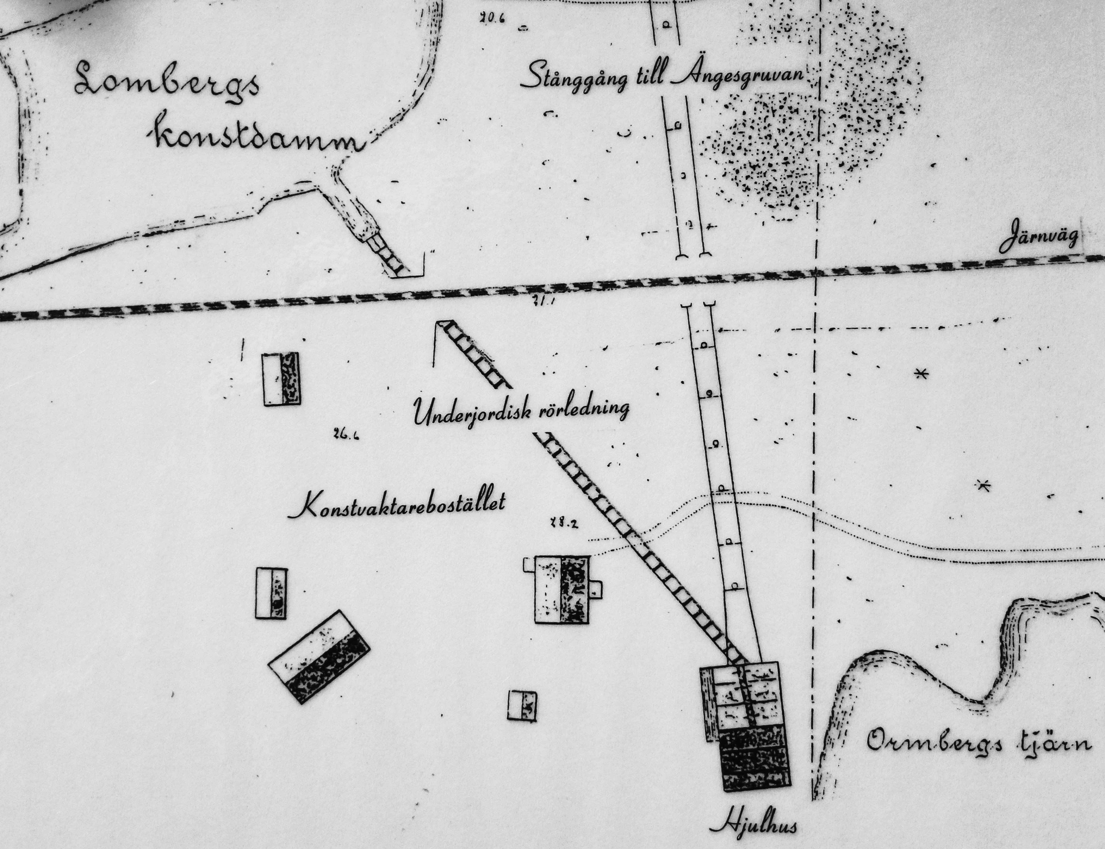 Planritning över Lombergshjulet och omgivning